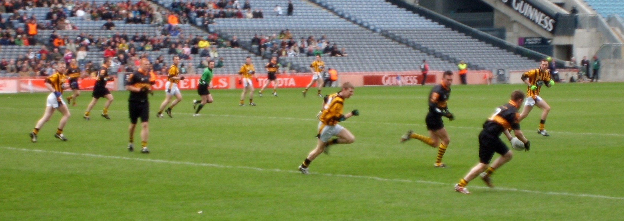 Gaelic Football im Croke Park (All Irish Club Finals 2007)